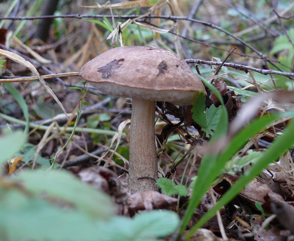 Подберезовик обыкновенный